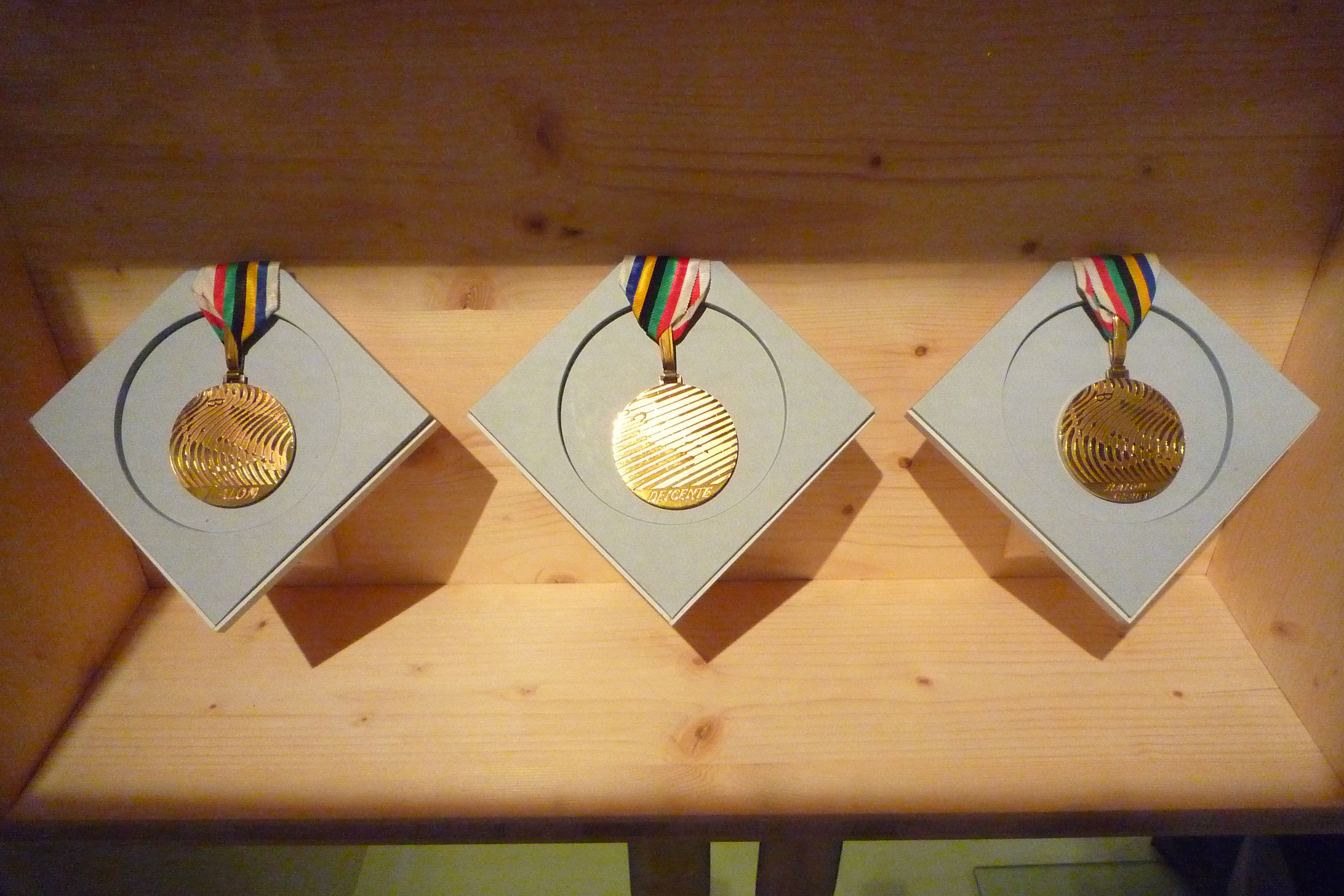 Les 3 médailles d'or de Jean-Claude Killy aux Jeux olympiques de 1968 à Grenoble. Exposées au musée dauphinois : Grenoble 1968. Les Jeux olympiques qui ont changé l'Isère (février 2018 à janvier 2019)